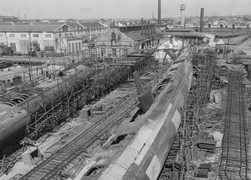 „Miasto Mikołajów po zajęciu przez wojska niemieckie. Zniszczona stocznia radziecka z dwoma niezbudowanymi do końca okrętami podwodnymi.”